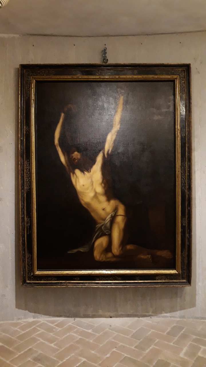 Museo della Linea dei Goti This is a photo of a monument which is part of cultural heritage of Italy.